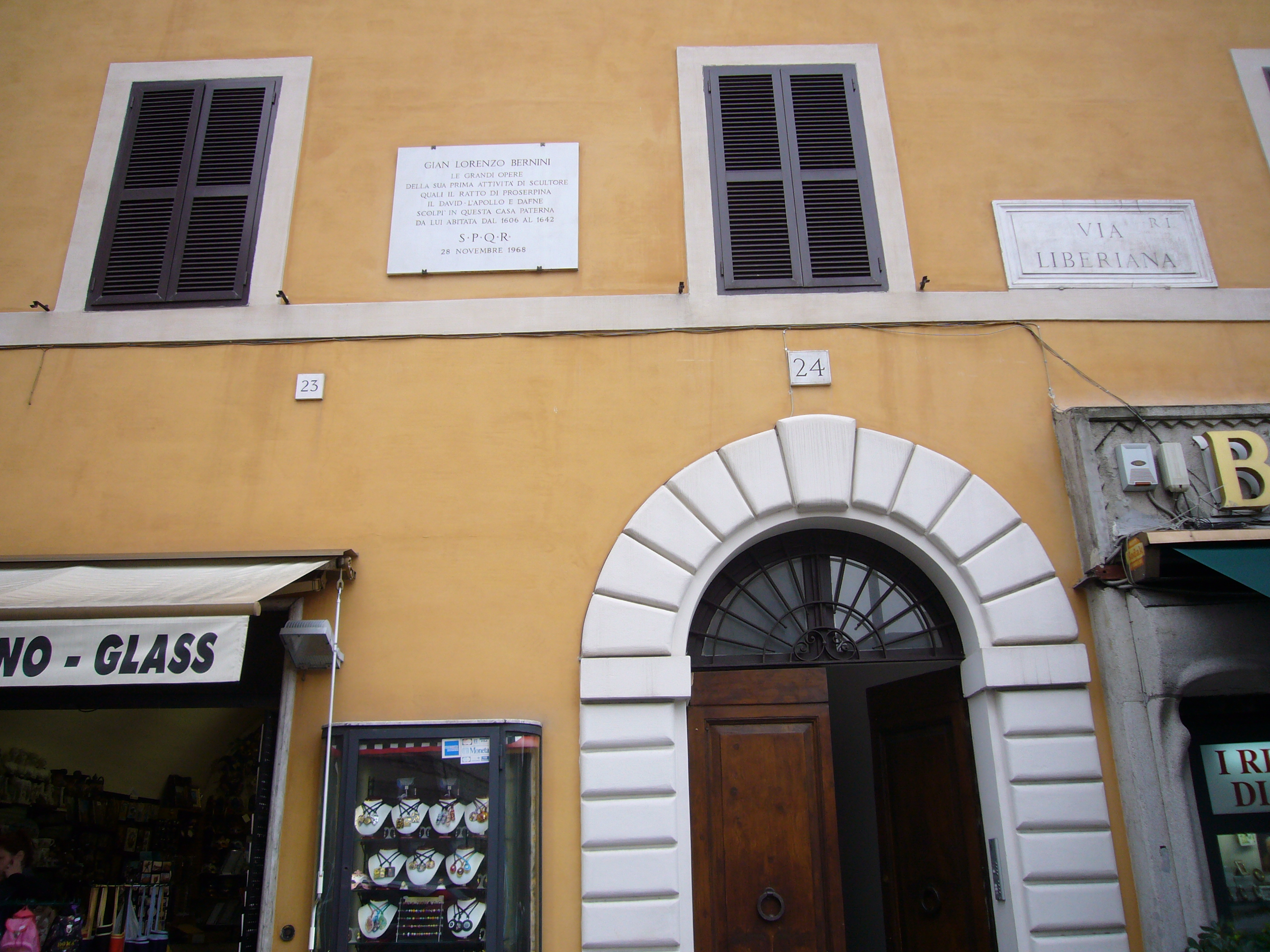 Roma, lapide commemorativa del 1968 sulla casa di famiglia di Bernini a via Liberiana, presso Santa Maria Maggiore (dove esiste ancora la tomba della famiglia Bernini):"Gian Lorenzo Bernini / le grandi opere / della sua prima attività di scultore / quali il Ratto di Proserpina / il David, l'Apollo e Dafne / scolpì in questa casa paterna / da lui abitata dal 1606 al 1642"